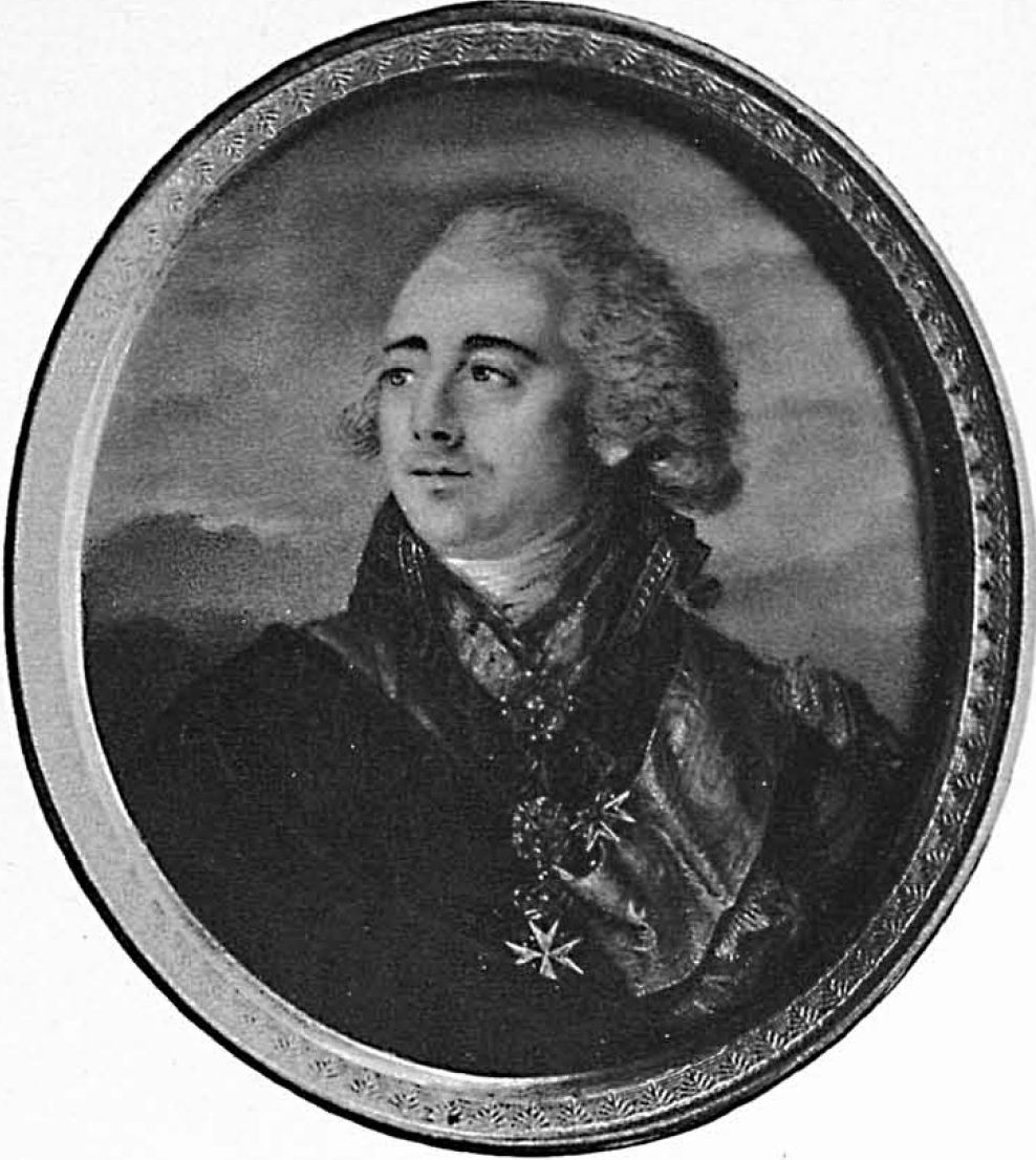 Граф Иван Павлович Кутайсов (1759-1834)